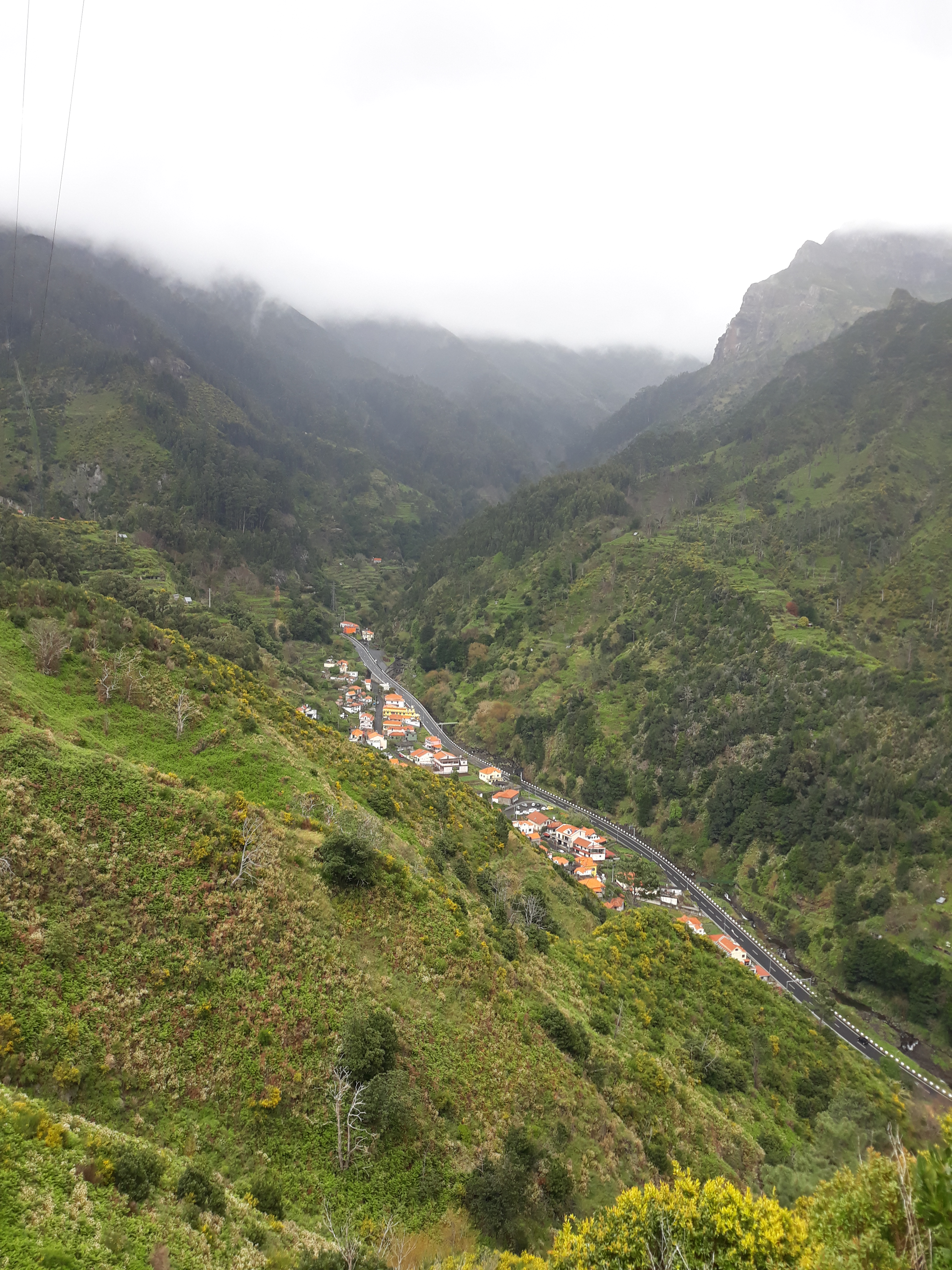 encomeada